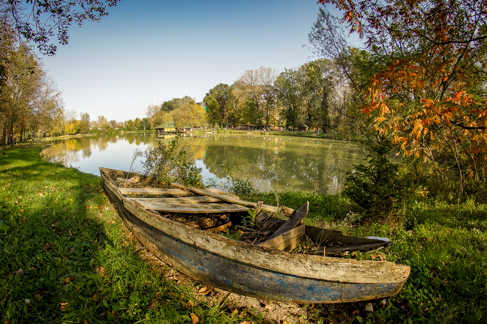 ЗС01 Napusten camac se savrseno uklapa u ovaj raj za pecarose